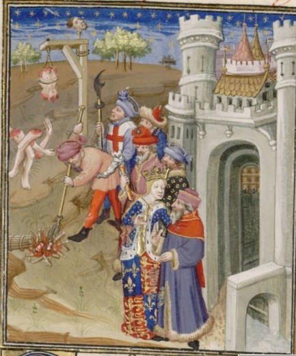 Supplice de Hugues Despenser